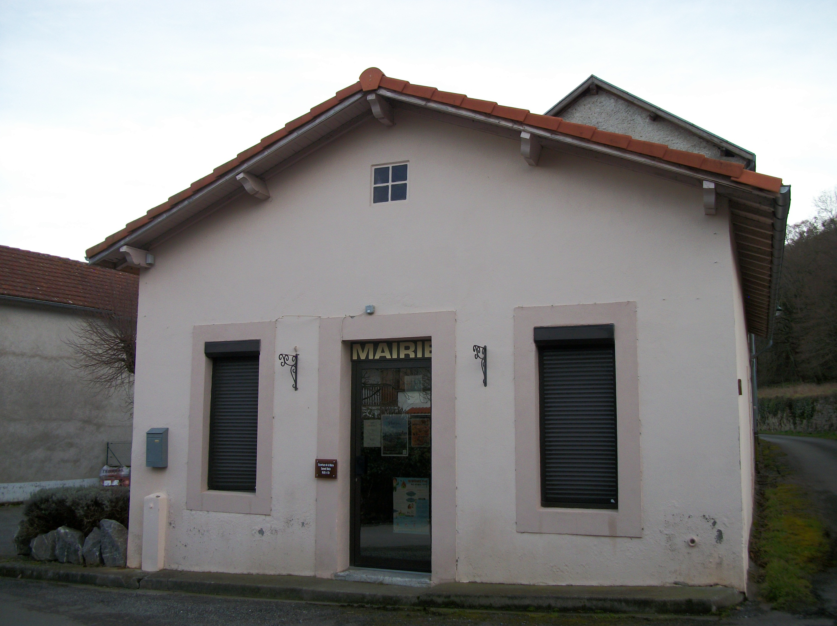 La mairie